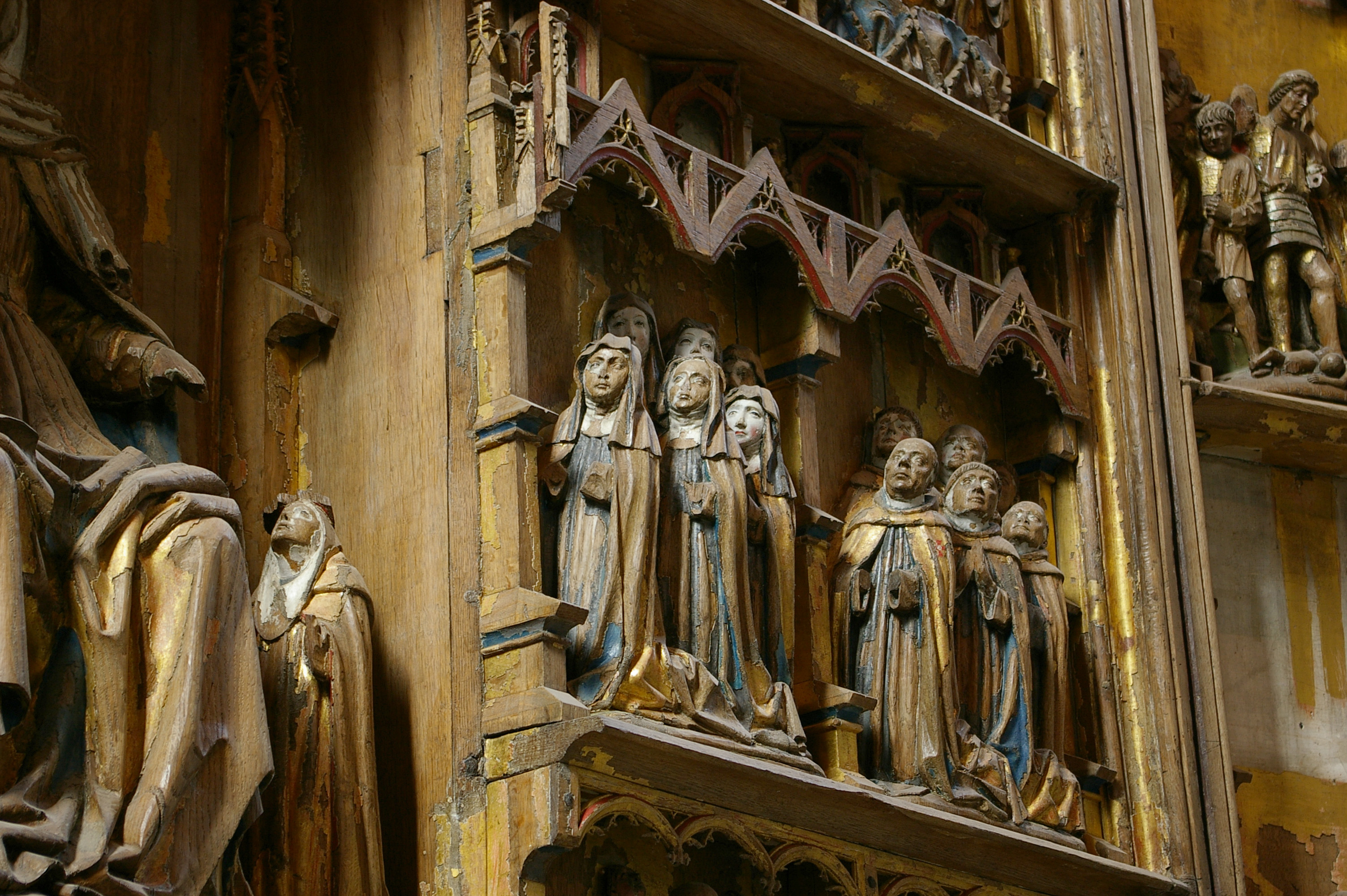 Vadstena klosterkyrka, detaljk av altarskåp, Östergötland, Sverige.